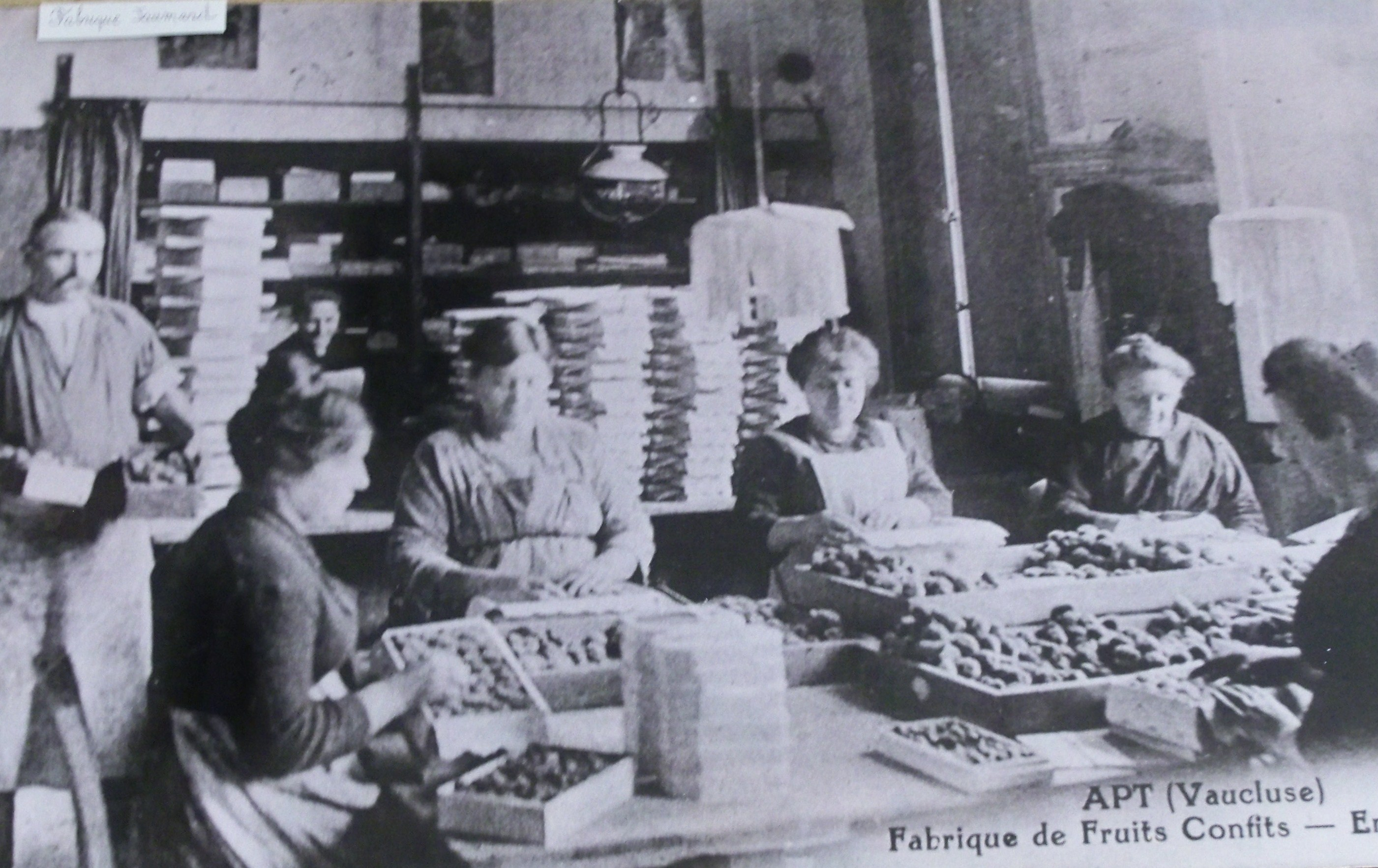 Carte postale ancienne sur l'emballage de fruits confits à Apt, Vaucluse, France